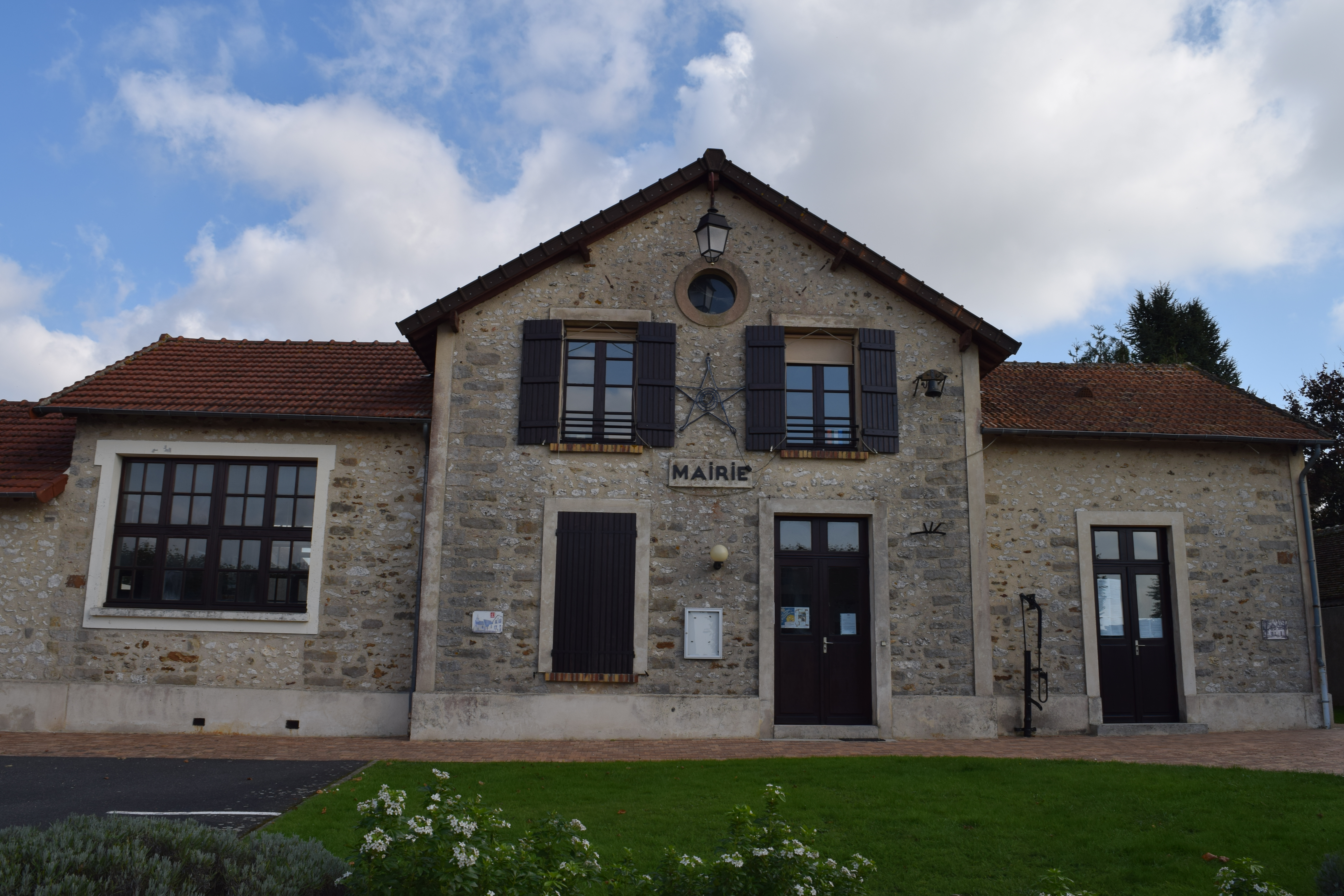 La mairie de Clos-Fontaine vue de face